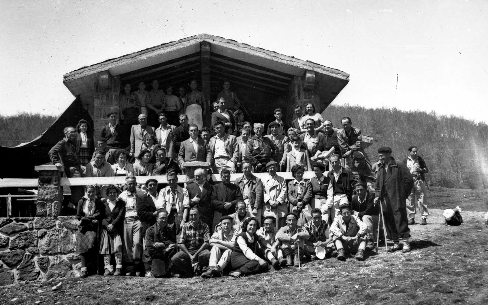 Euskal agintari eta mendizale talde bat mendia. Aizkorri, Gipuzkoa. Euskal Herria. (Euskara) Basque politicians and mountaneers group in the mountain. Aizkorri, Gipuzkoa. Basque Country. (Euskara)